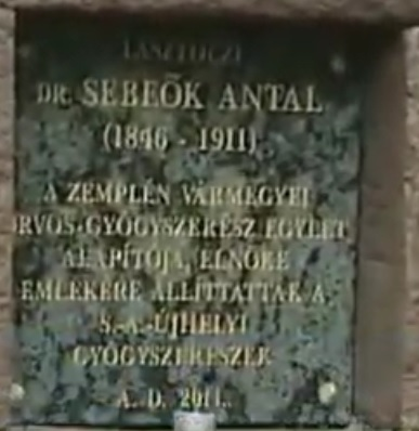 Lasztóczi dr. Sebeők Antal emléktáblája Sátoraljaújhely, Májuskút u. 81. sz. alatti ingatlan támfalán